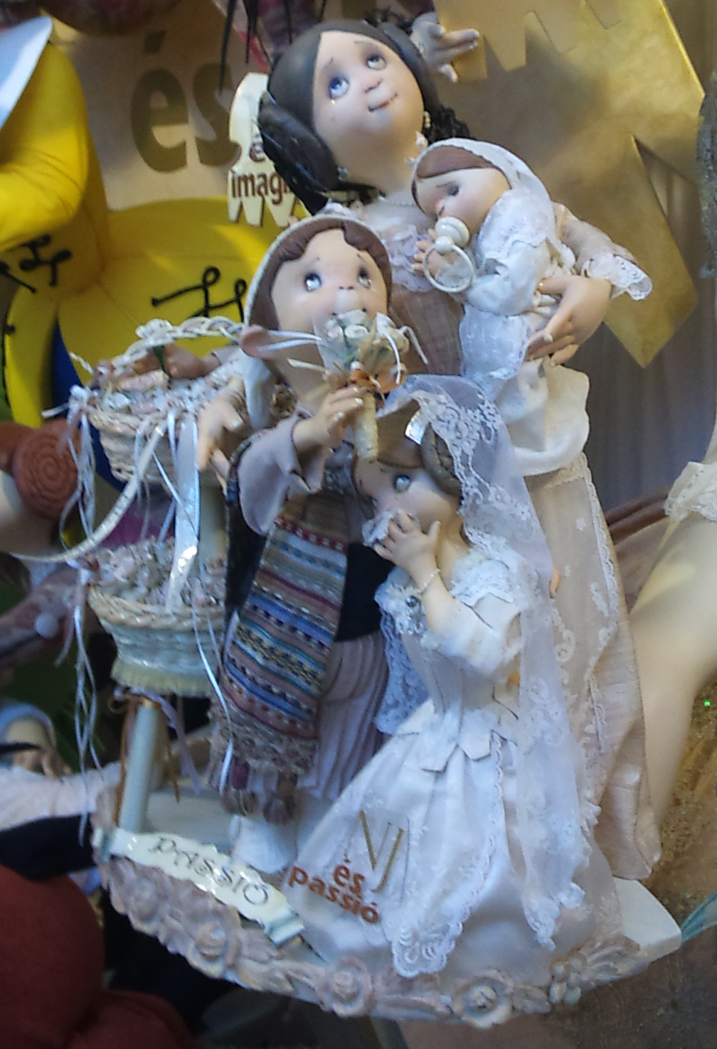 Ninot infantil indultat en 2012: "Passió" de Joan S. Blanch, plantat a Na Jordana